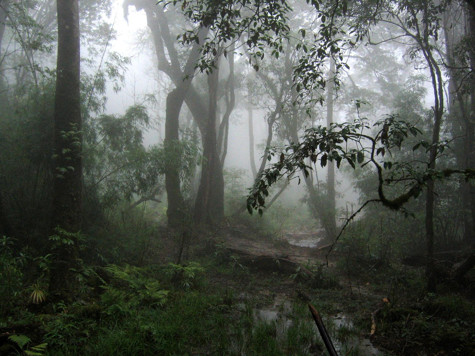 Szlak na Fansipan - około 1900 m n.p.m.